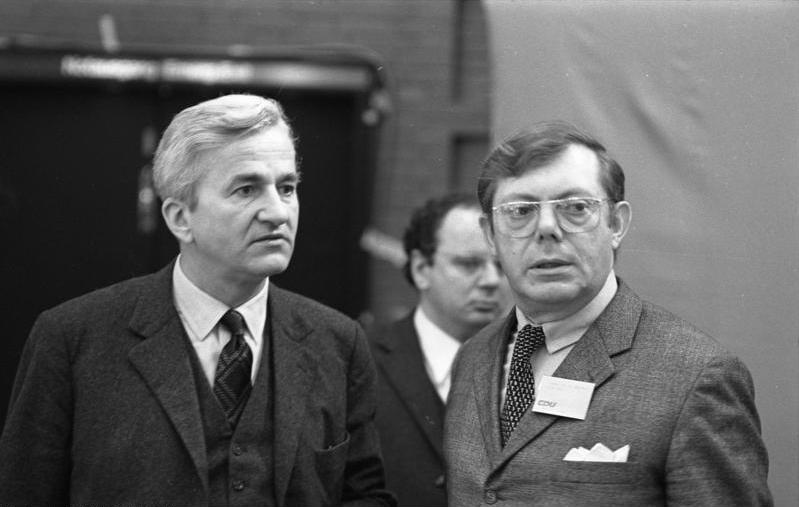 22. Bundesparteitag der CDU in Hamburg (links: Richard Karl Freiherr von Weizsäcker, rechts: Welt-Chefredakt. Herbert Kremp) 18.-20.11.1973